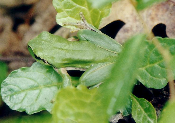 Mittelmeer-Laubfrosch Zitat von der Webseite: Copyright (c) 2003 - 2007 Valéry BEAUD (vbeaud {at} free {dot} fr) Permission is granted to copy, distribute and/or modify this document under the terms of the GNU Free Documentation License, Version 1.2 or any later version published by the Free Software Foundation; with no Invariant Sections, with no Front-Cover Texts, and with no Back-Cover Texts.